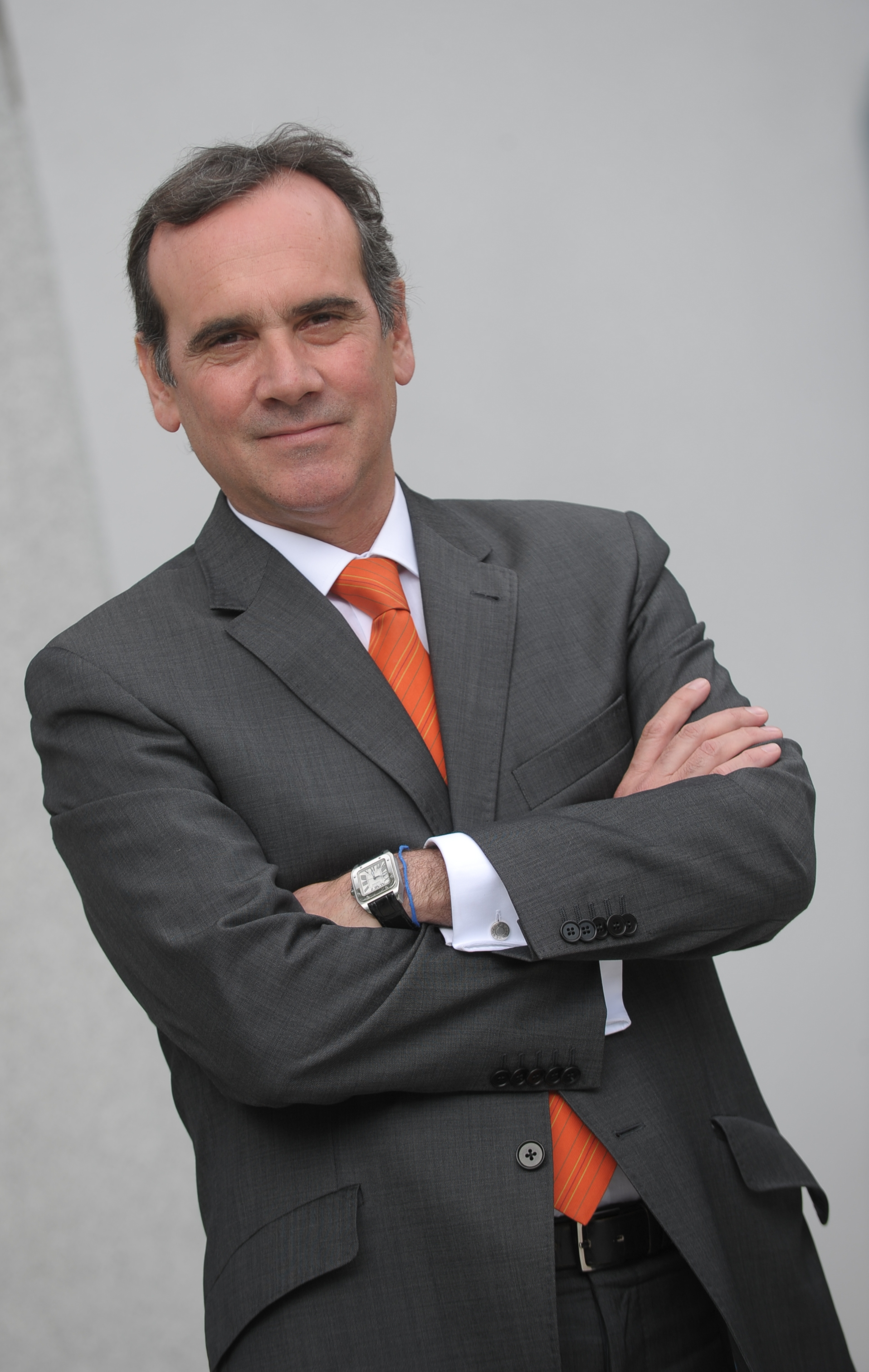 Gonzalo Garland, is Vicepresident of External Relations at the IE Business School